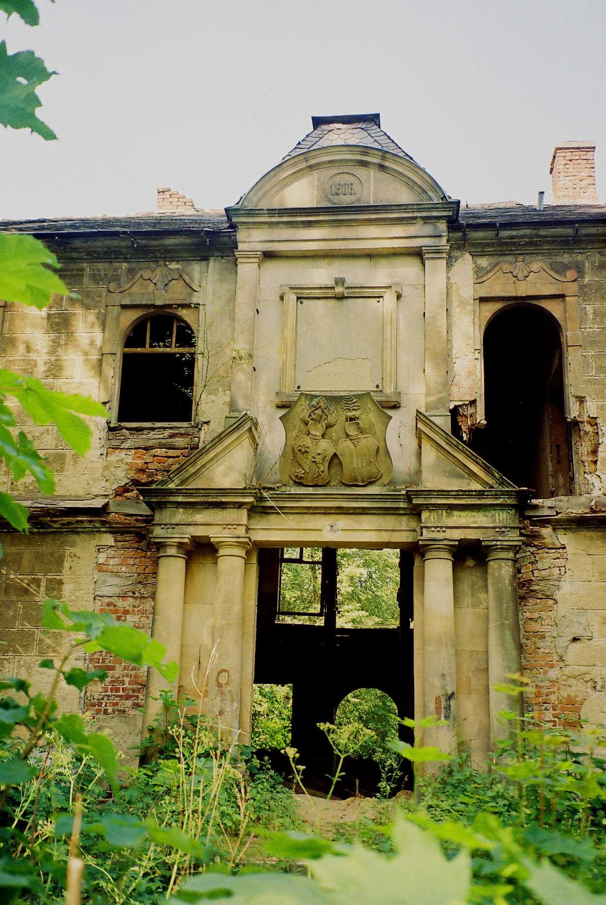 Wziąchowo Małe 13f, pałac, XIX, 1906